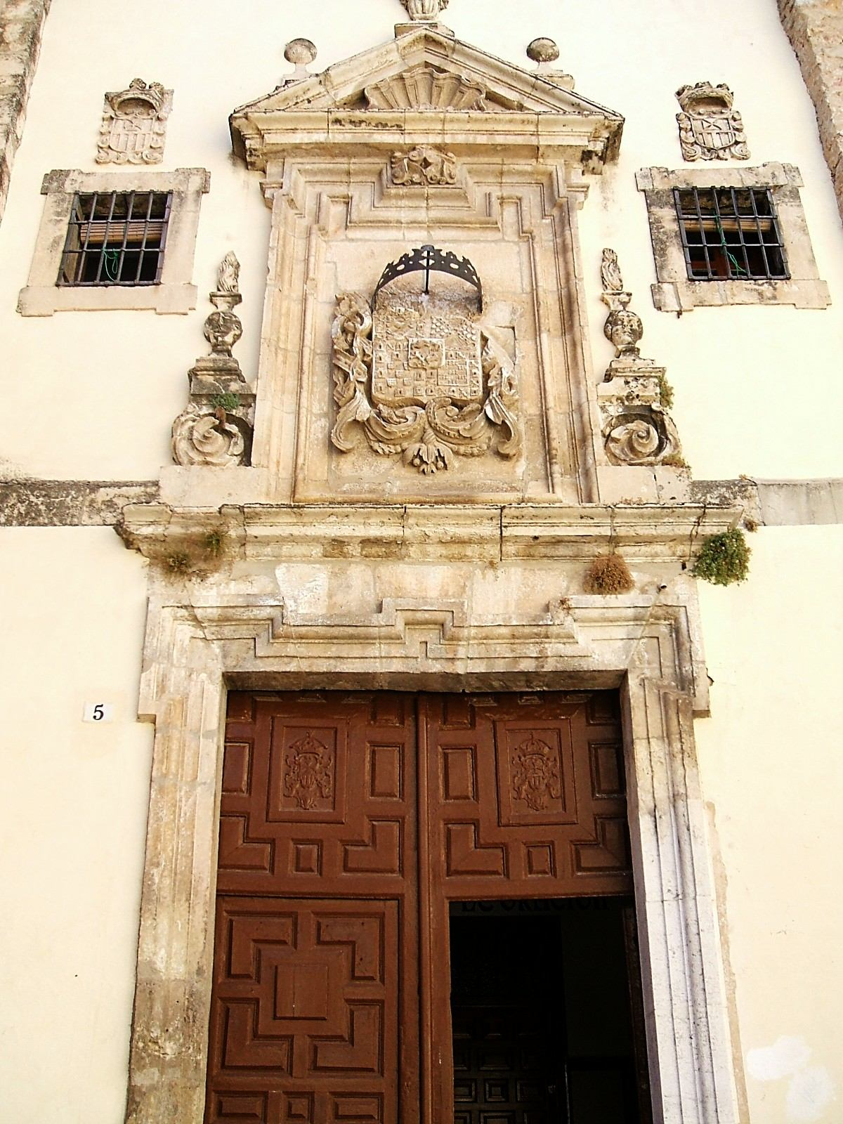 Portada del antiguo Convento de la Merced, hoy Convento de las Esclavas del Santísimo Sacramento (Cuenca, España)